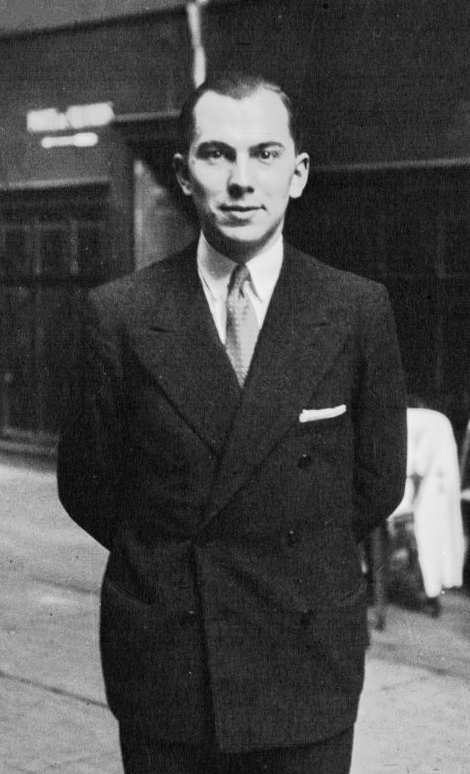 Championnats d'escrime : Lemoine, champion d'Europe : [photographie de presse] / Agence Meurisse